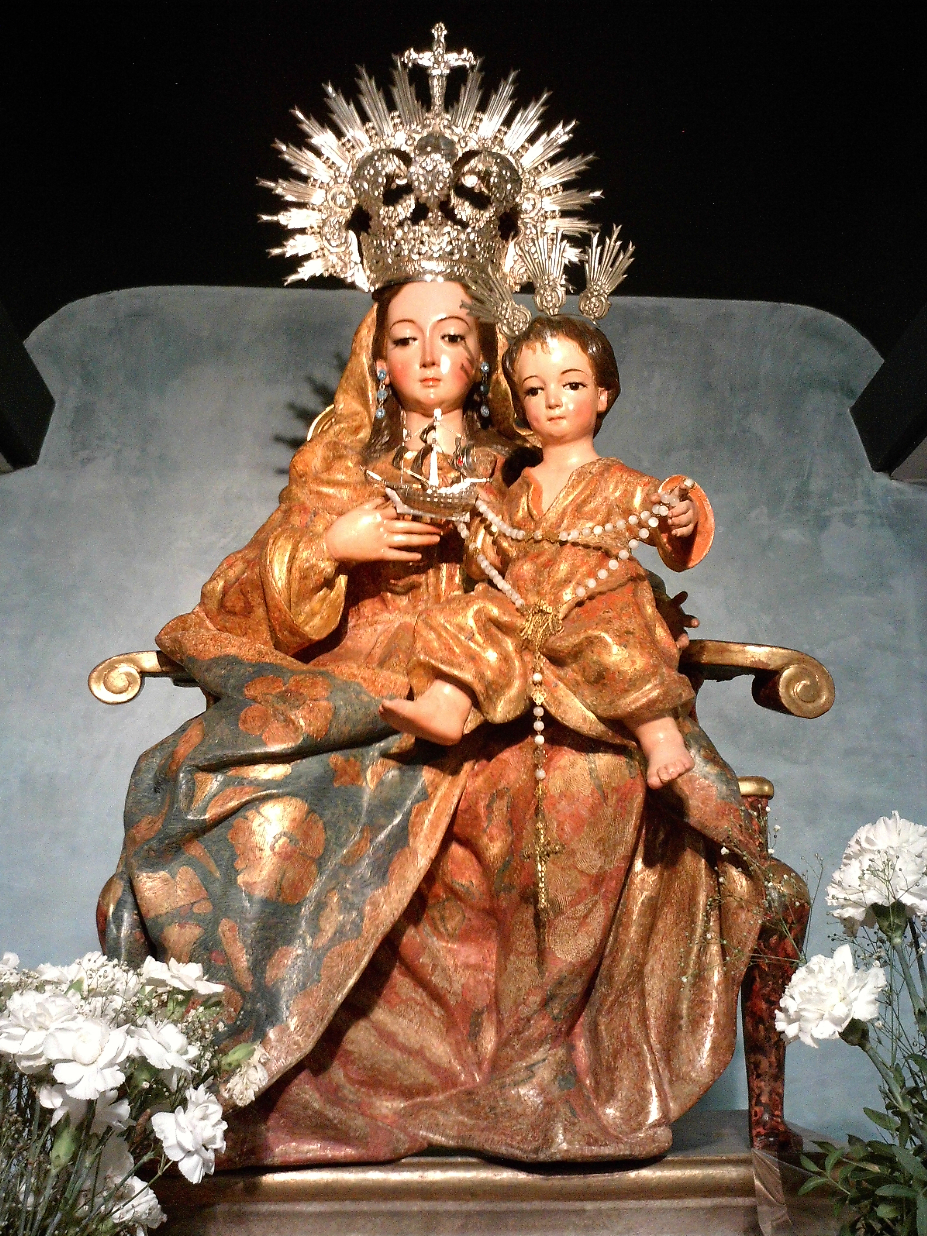 Virgen del Buen Aire. Iglesia de Nuestra Señora del Buen Aire. Sevilla, Andalucía, España.